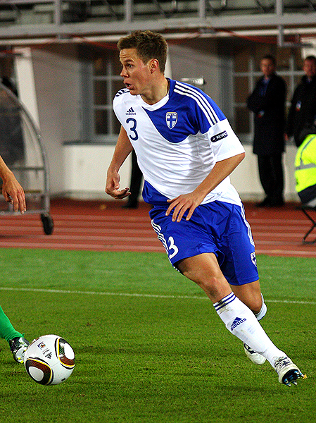 Jalkapalloilija Niklas Moisander